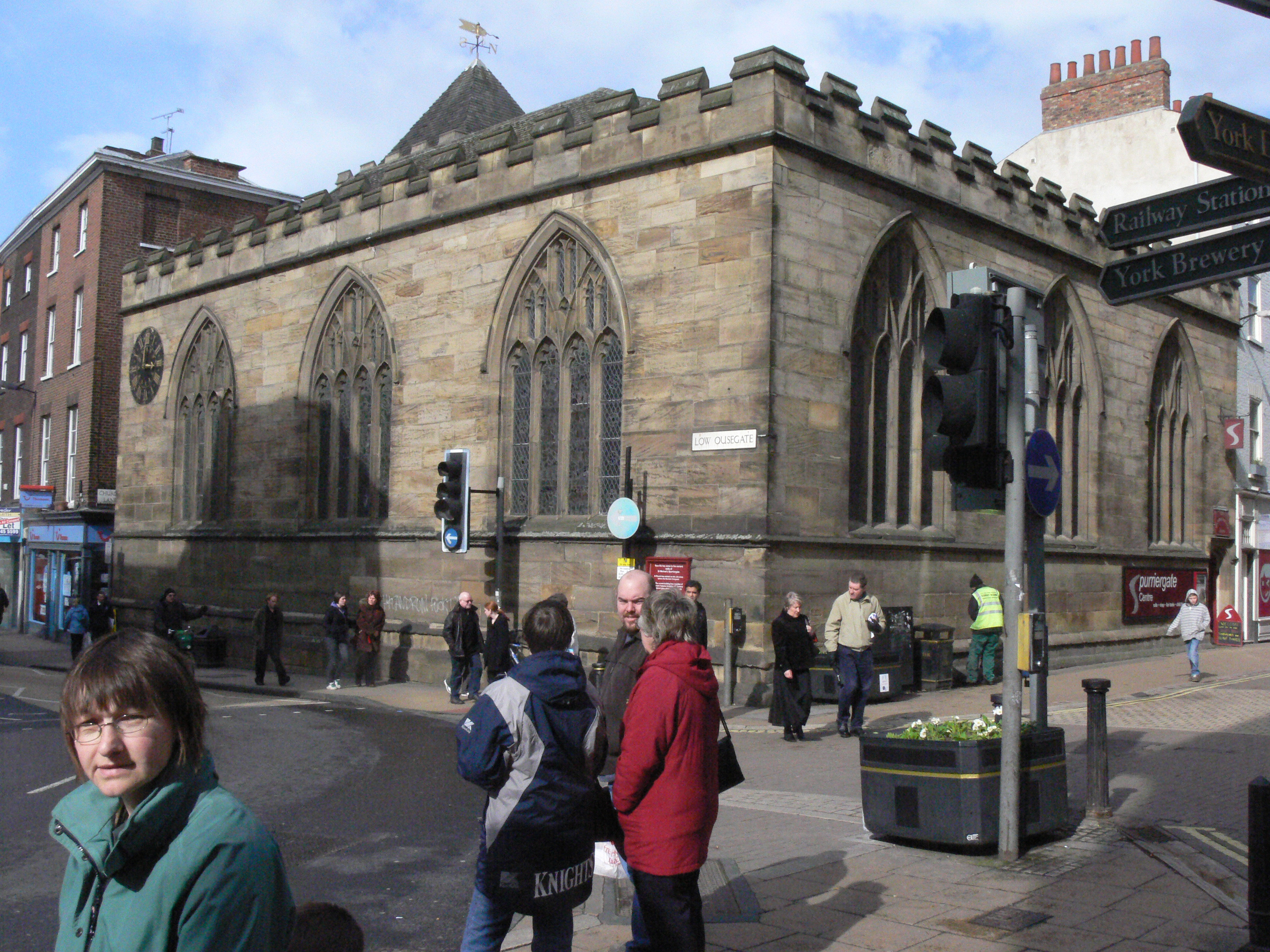 Spurriergate Centre in York, ehemals St. Michaels Kirche.